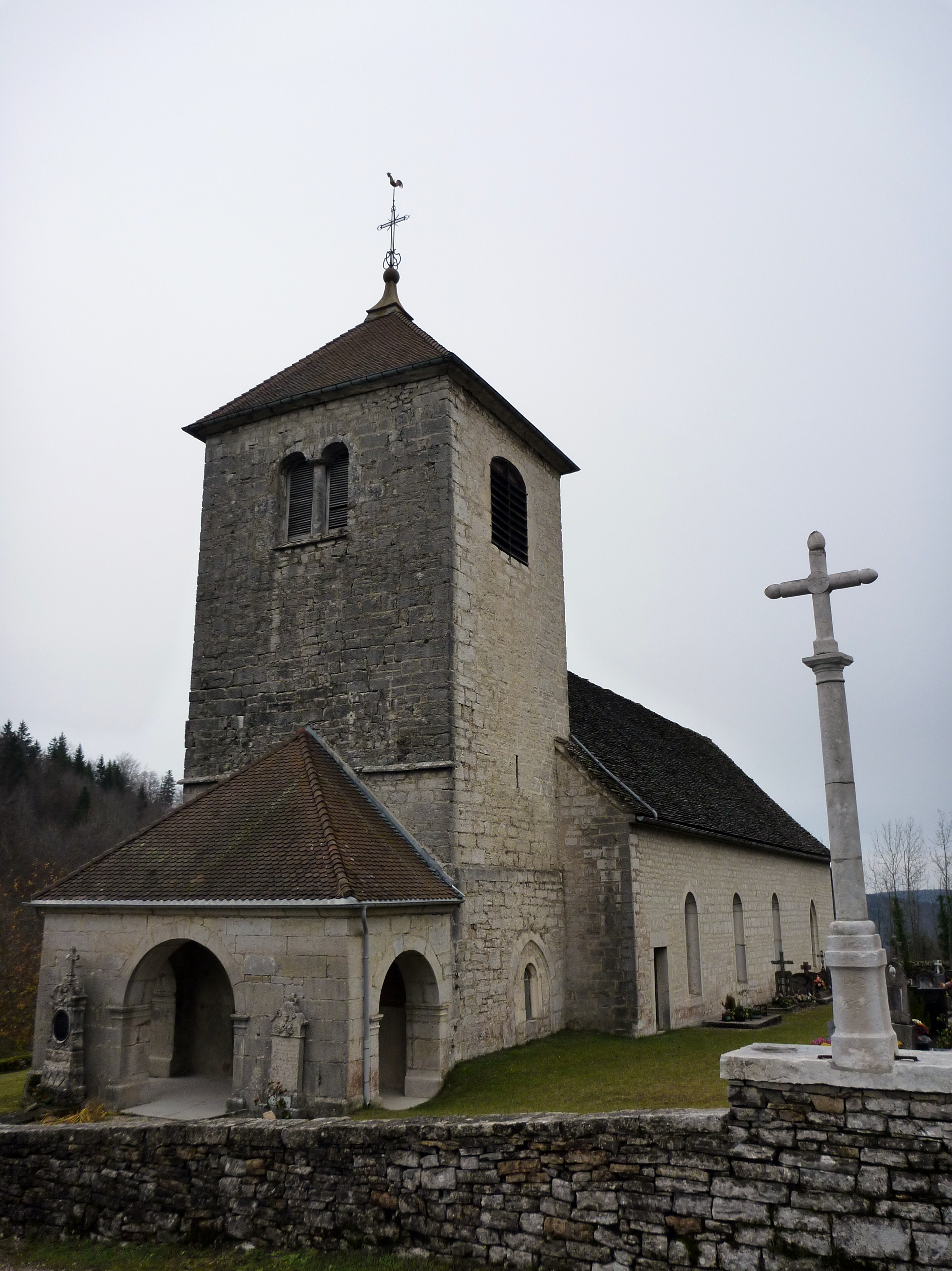 Photo de l'église de Fessevillers, vilages franc-comtois dans le Doubs.